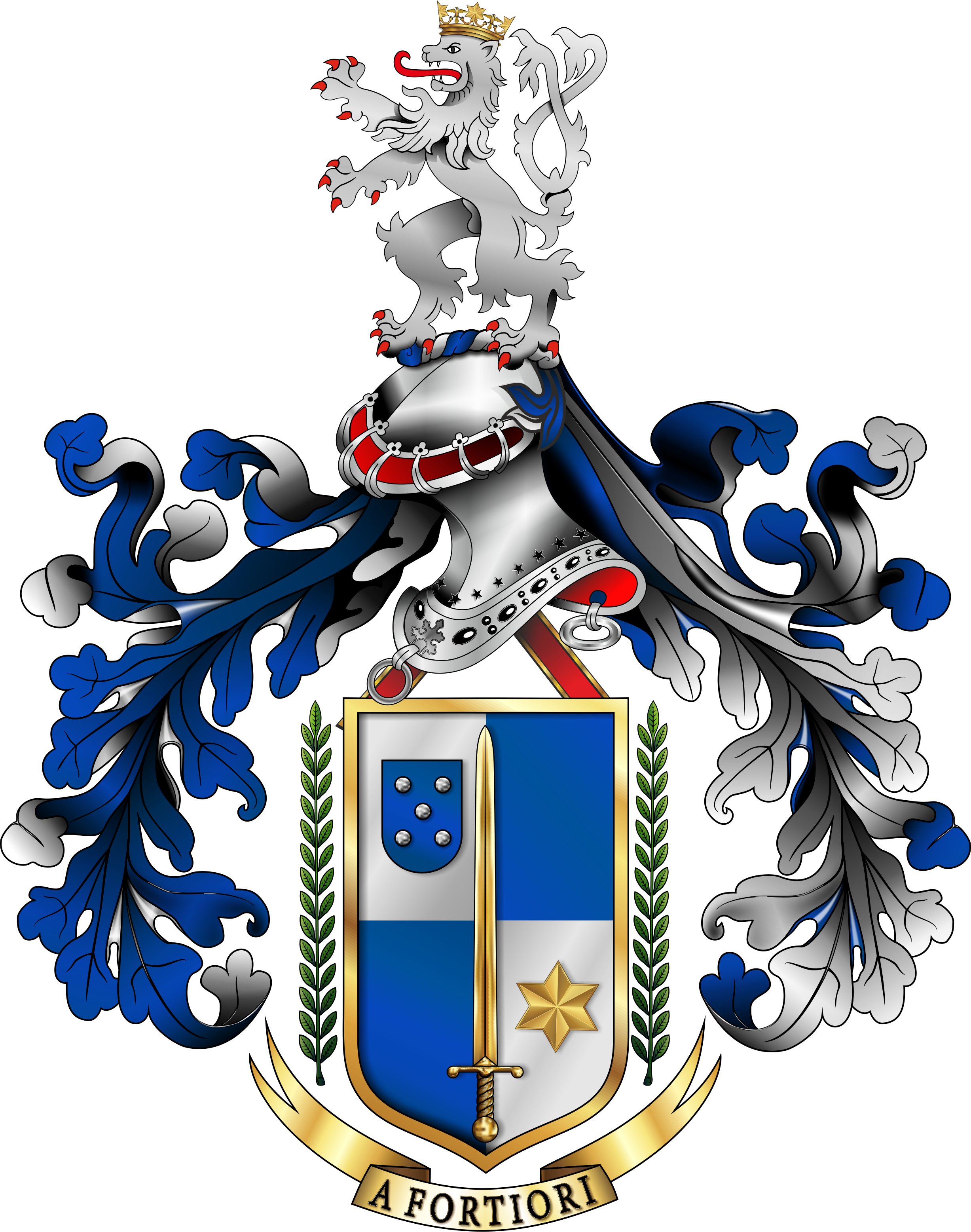 Brasão de Armas do Corpo de Intervenção da PSP